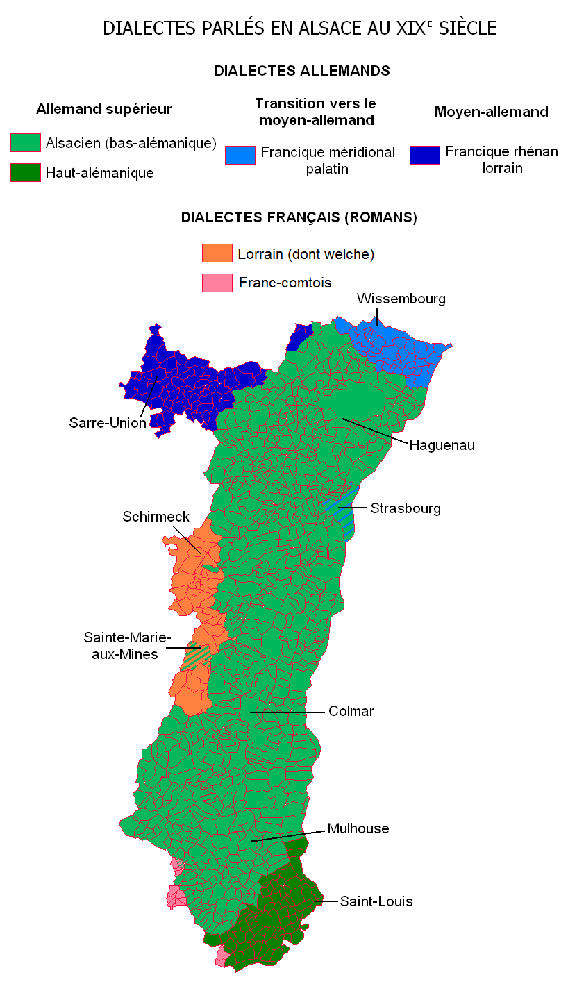 Carte créée par moi-même. Sources: Grenzorte des alemannischen Dialektraums et cartes historiques à